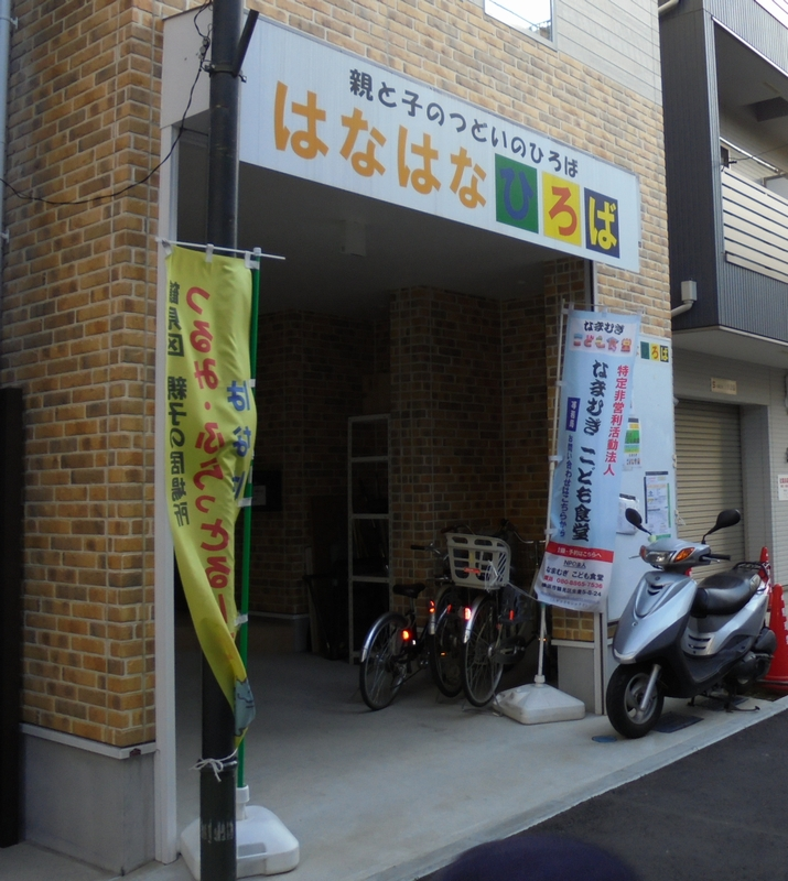 Namamugi Kodomo Shokudō, Yokohama, Japan